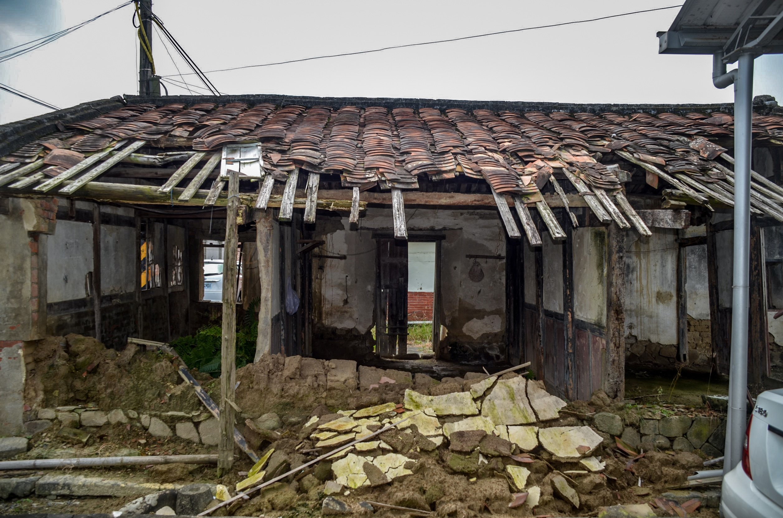 鹿陶江家聚落為目前台灣保存完整的最大傳統單姓宗族聚落 土埆厝:據傳為1896年建造，僅部分屋瓦崩落。土埆厝以泥土、稻桿、稻穀、竹等自然素材為主要材料，優點為隔熱性強，冬暖夏涼，清爽舒適，缺點是怕水，如遇下雨積水會融化或脫落。